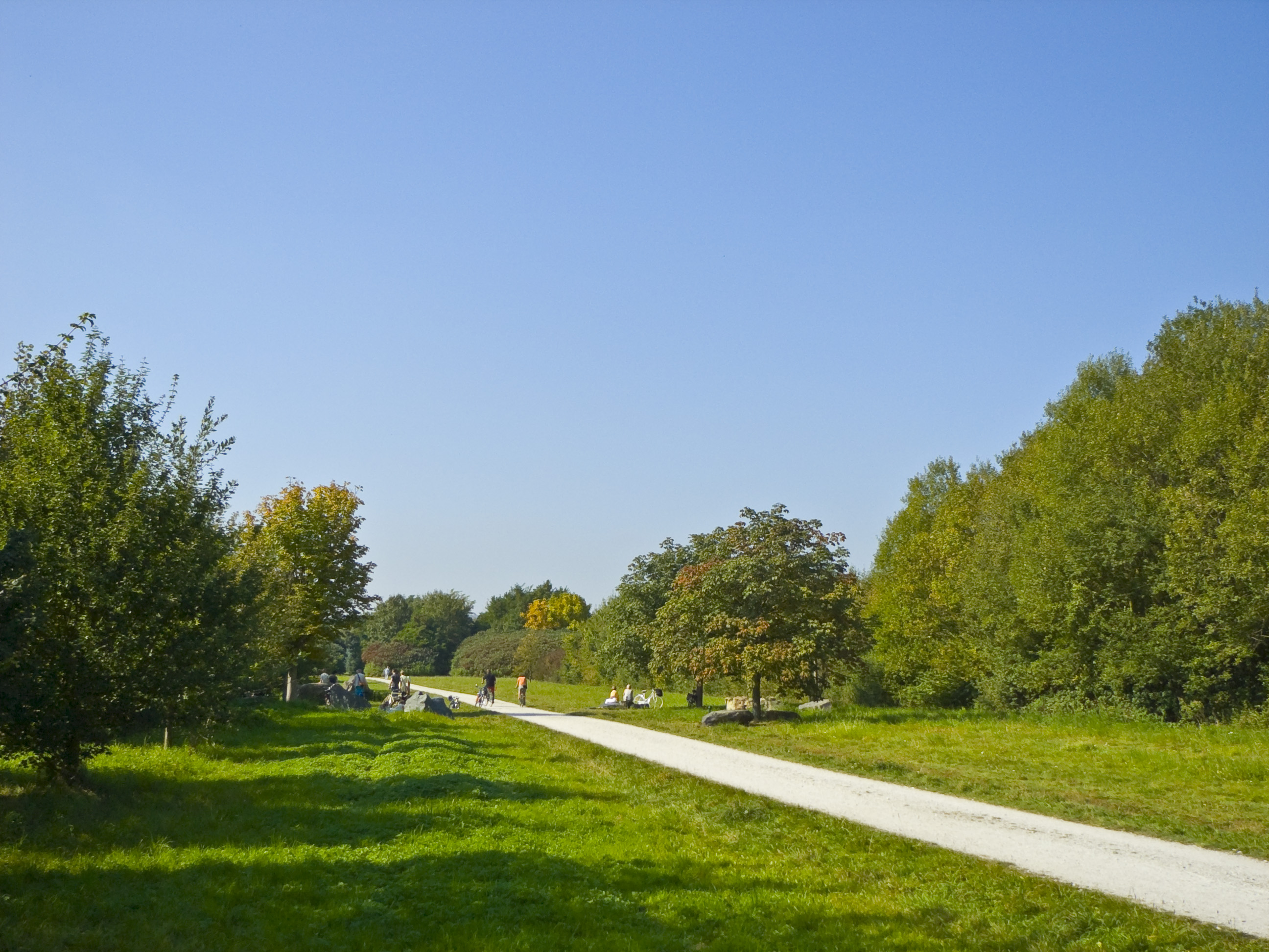 Arboretum Main-Taunus, Geologischer Lehrpfad (G)